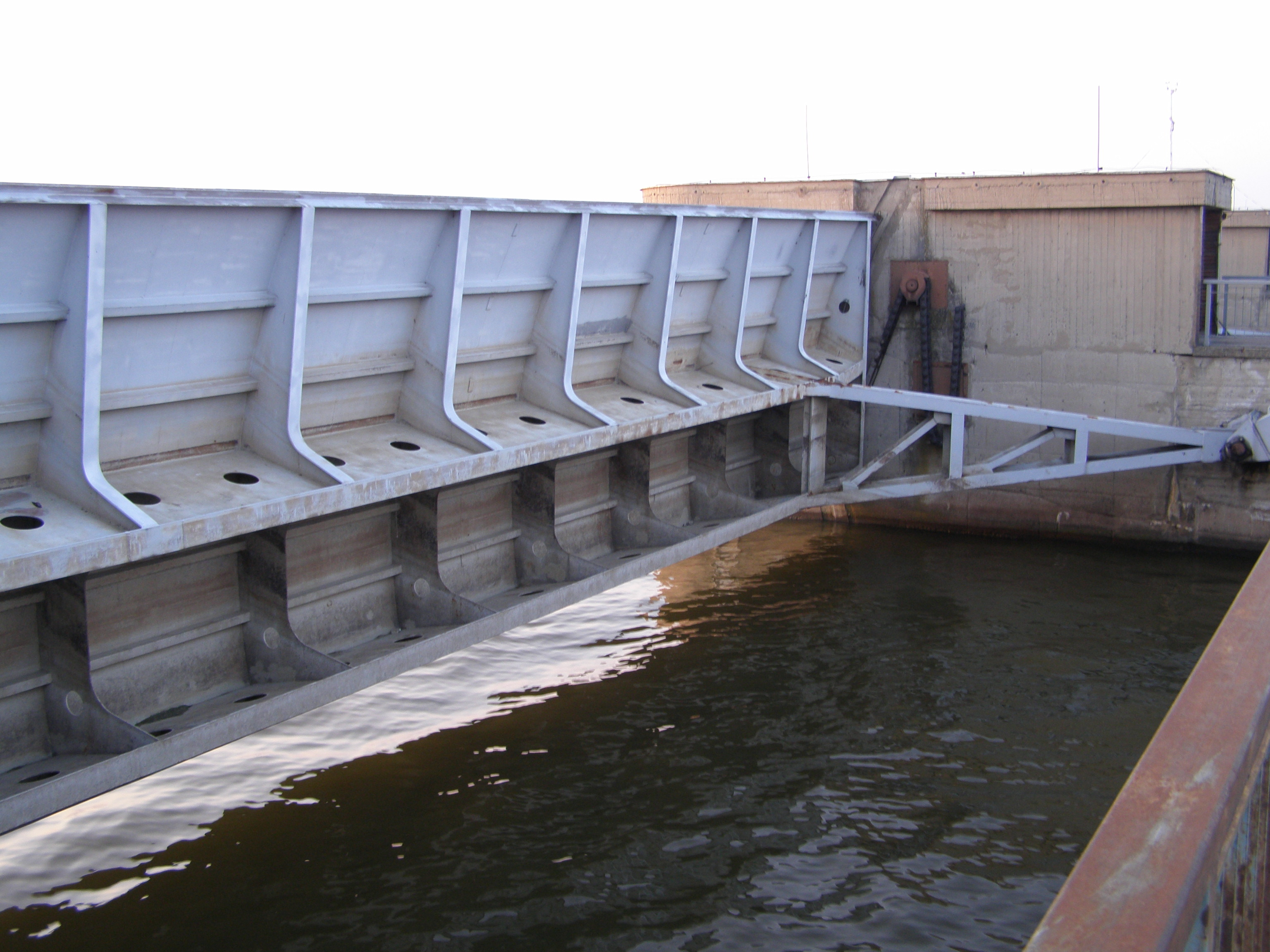 Vodní nádrž Nové Mlýny, stavědla druhé (věstonické) hráze